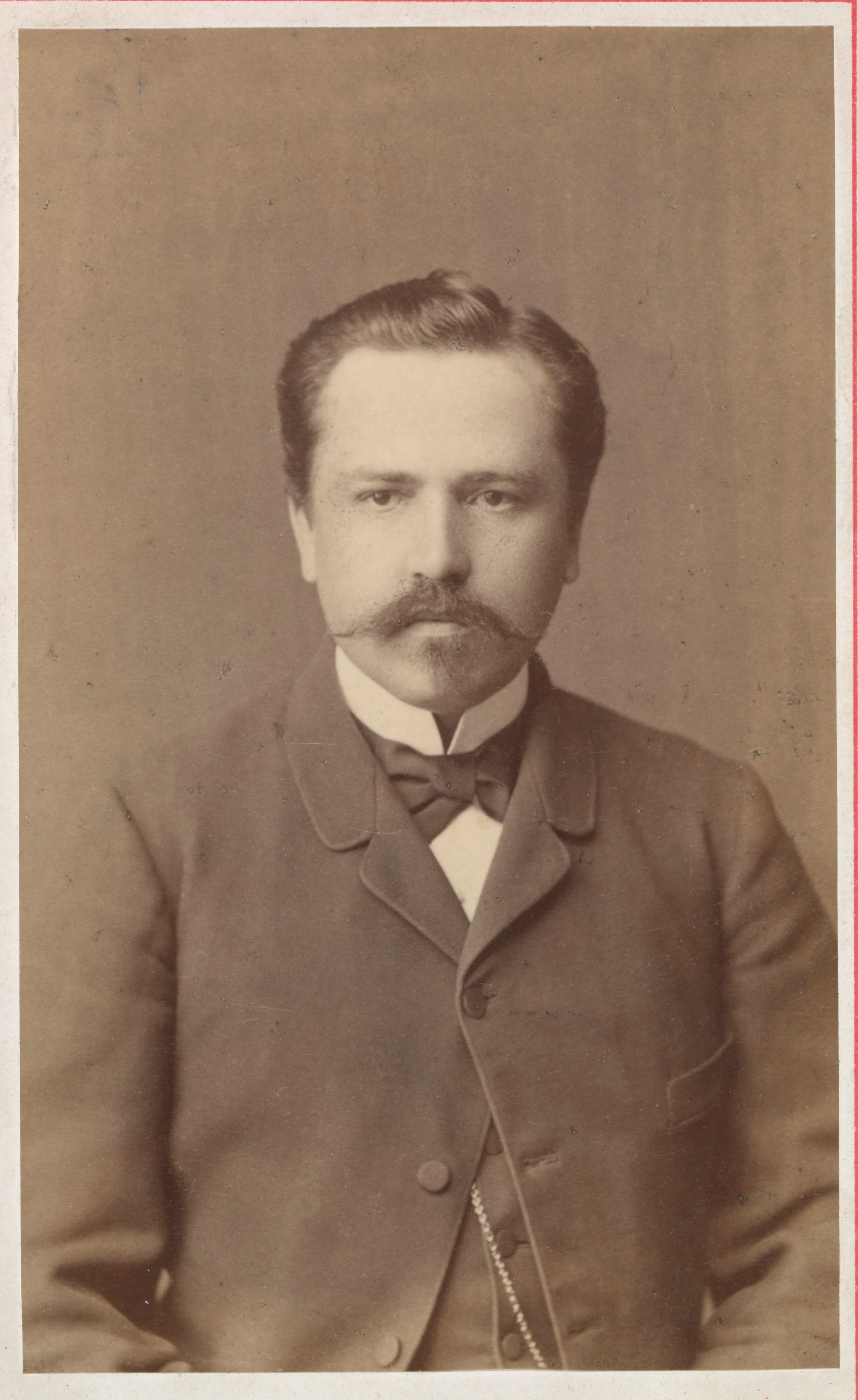 Franciszek Mieczysław Głuchowski